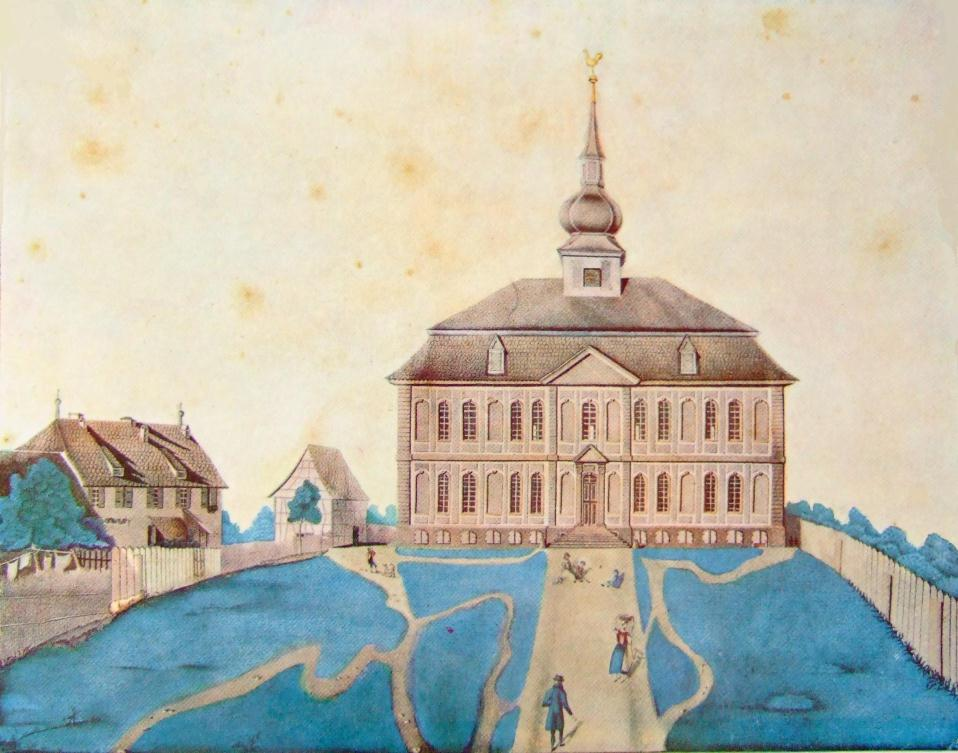 Kolorierte Zeichnung des elsässischen Schlosses Brumath